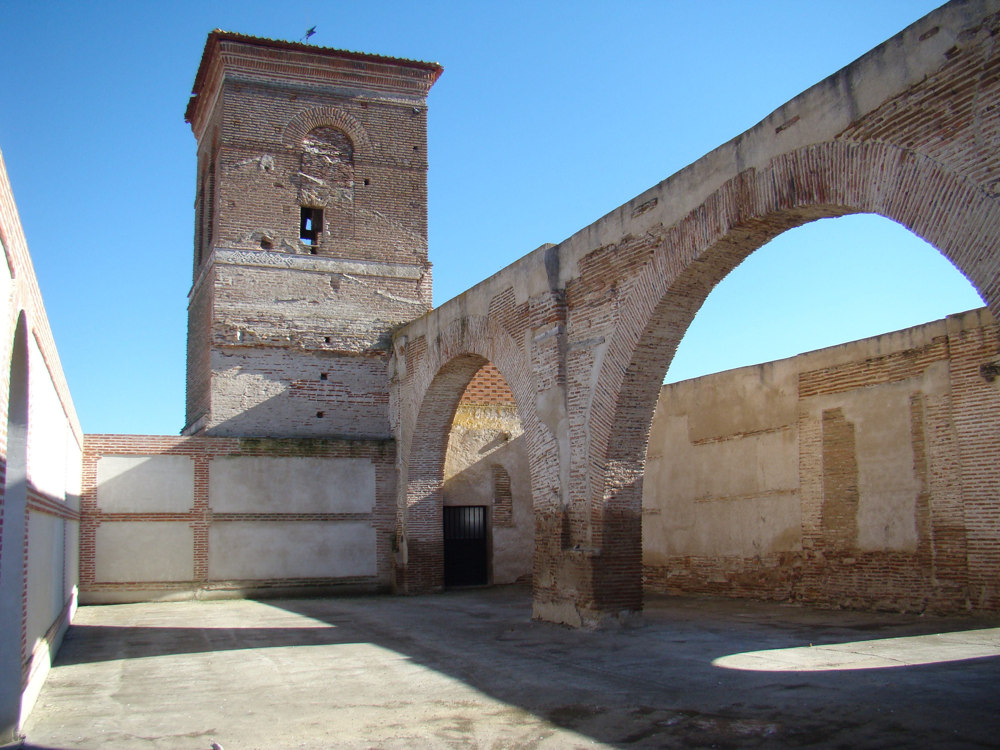 Moraleja de las Panaderas en la provincia de Valladolid, España. Ruinas del interior de la iglesia de San Boal.